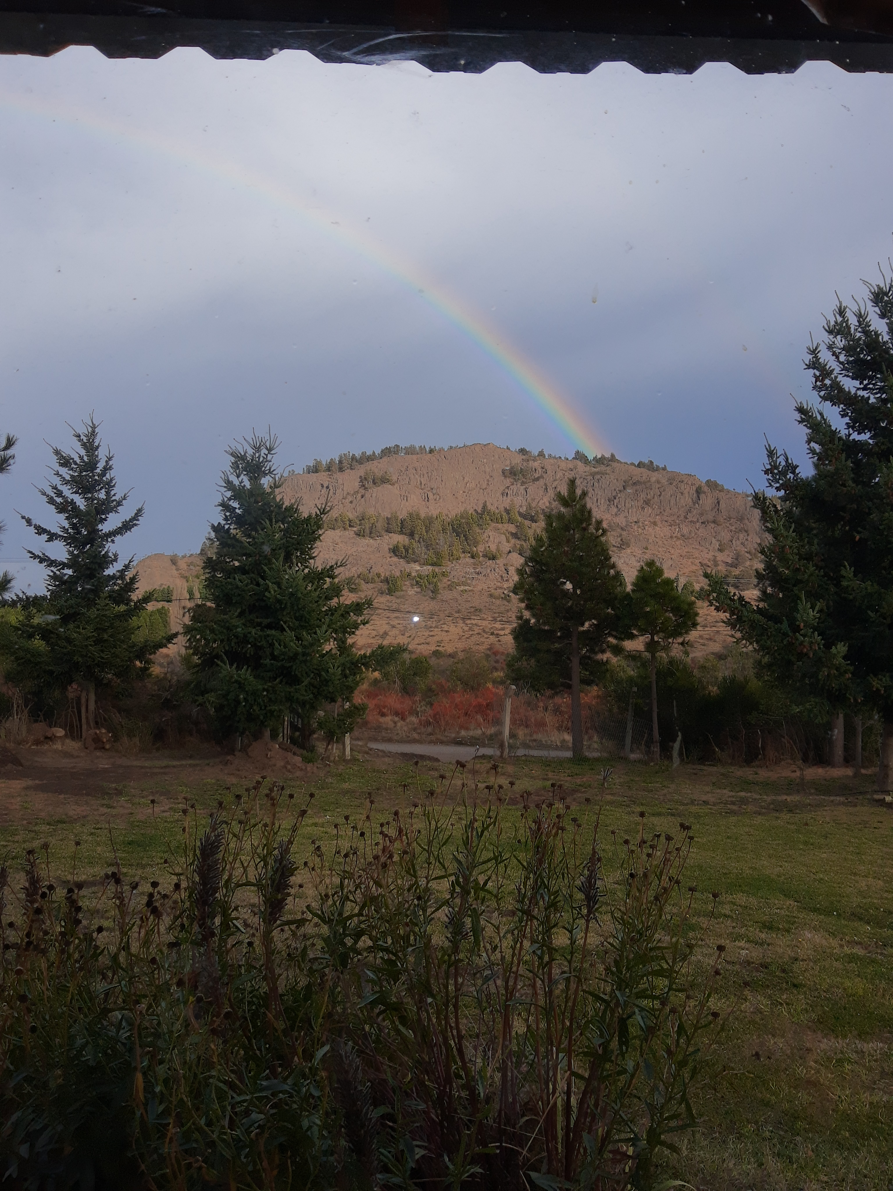 Zona de Ñirihuau. Con hermosos paisajes. Patagonia Argentina.